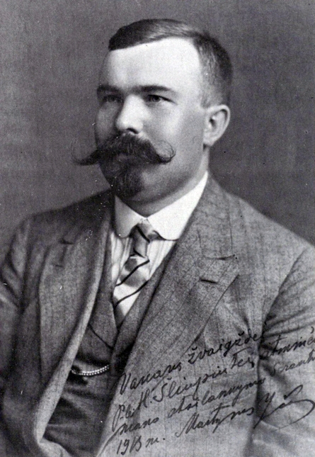 Ичас, Мартин Мартинович